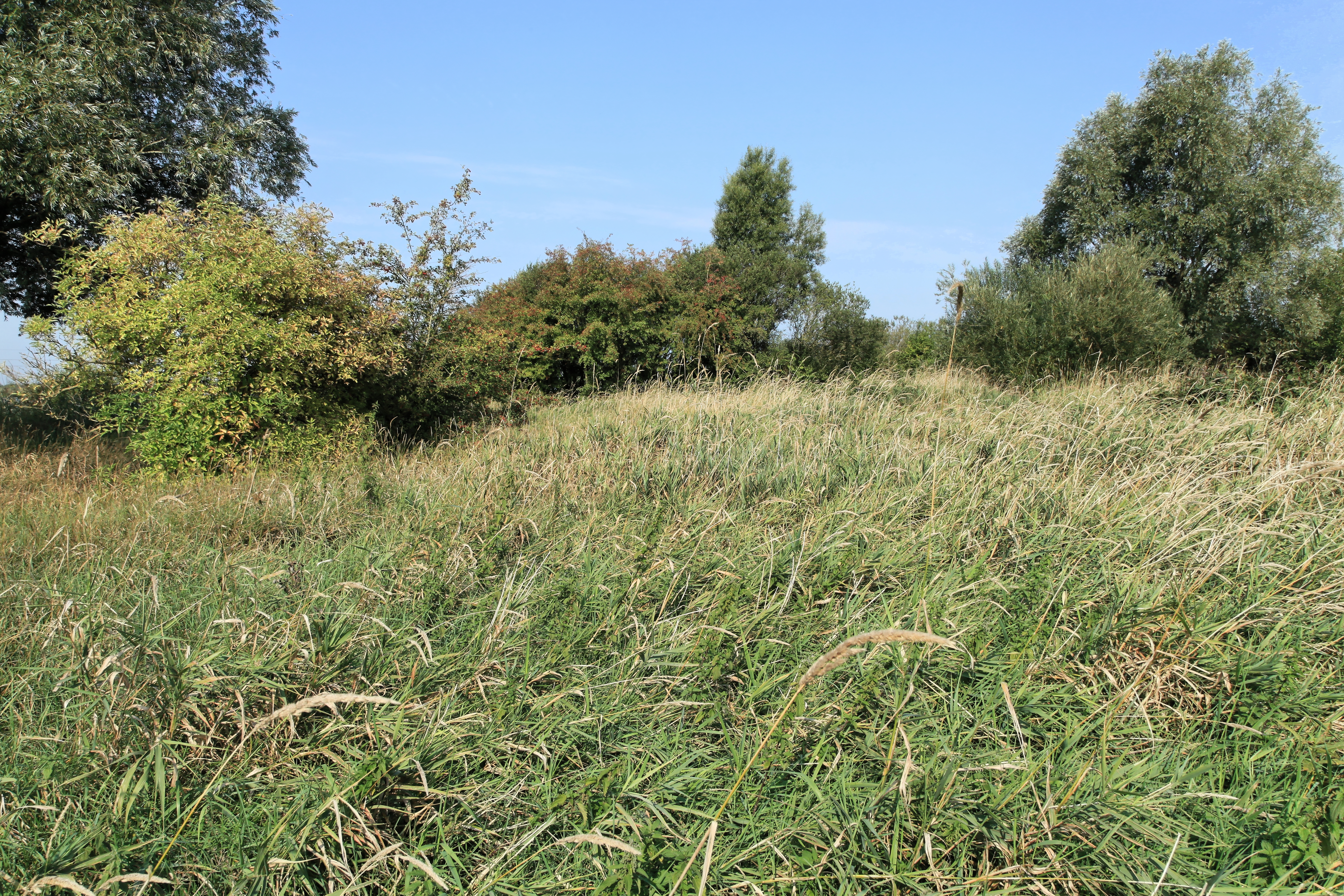 Gräberfeld auf dem Westerhammrich in Leer (Ostfriesland)